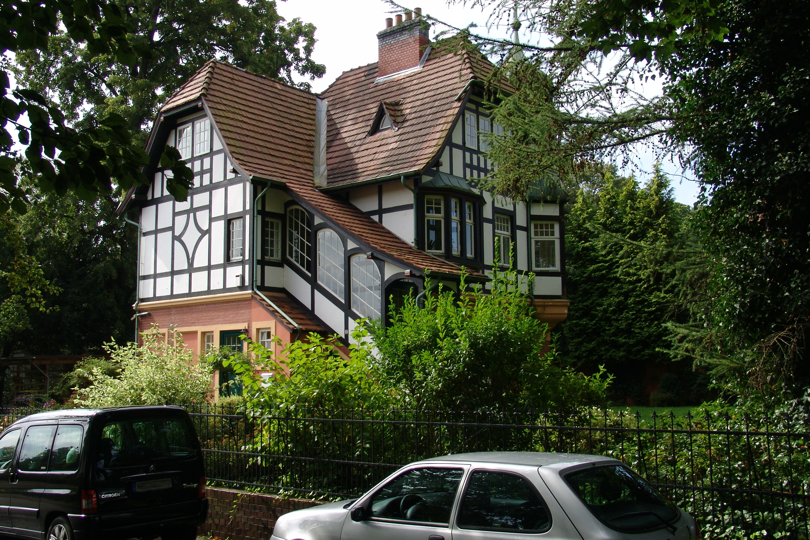 Strom-und Wasserversorgungszentrale in Bremen, Meierhofstraße 2.Das abgebildete Objekt ist ein geschütztes Kulturdenkmal in der Freien Hansestadt Bremen, mit der Nr. 1299 beim Landesamt für Denkmalpflege registriert.